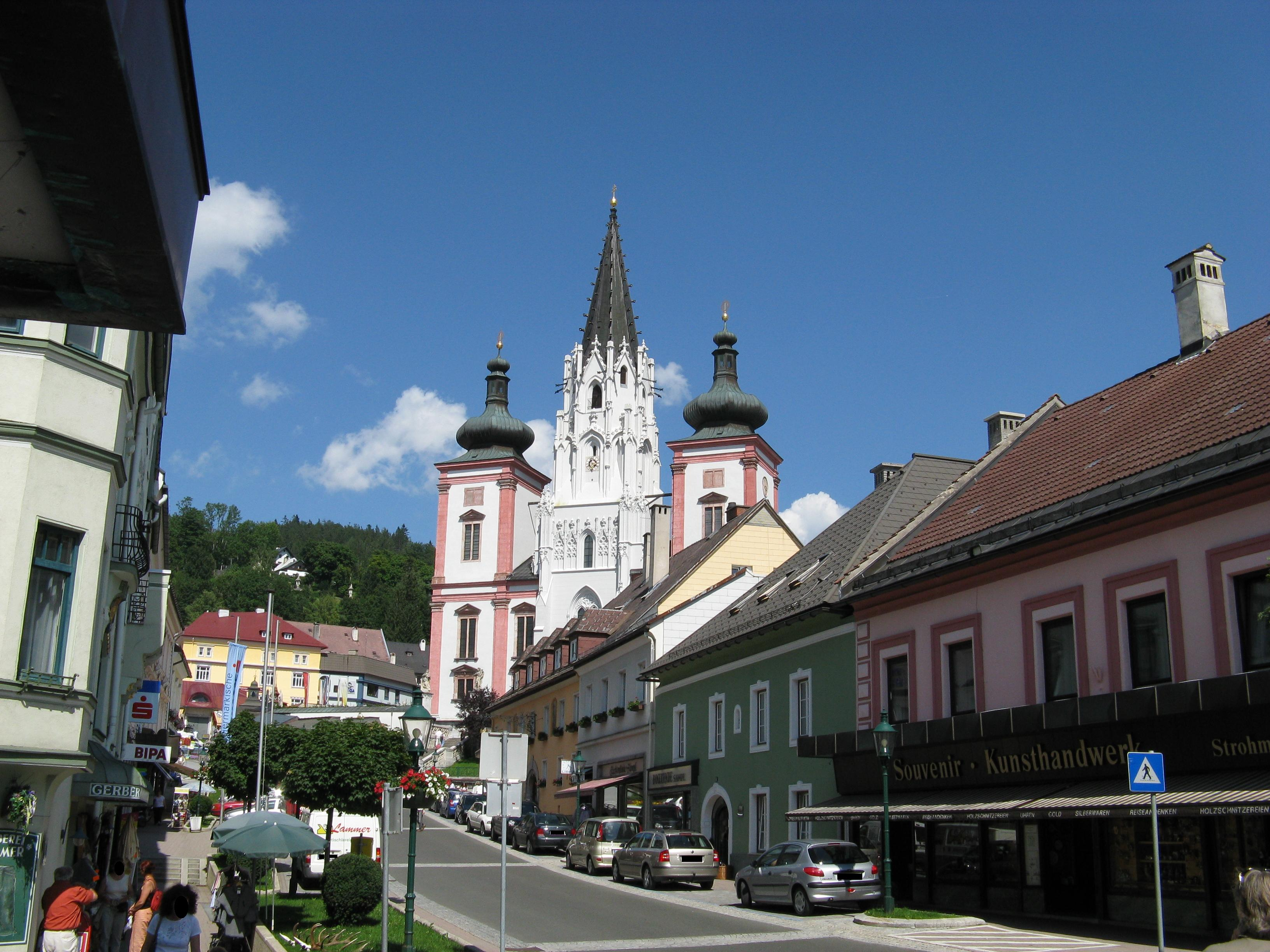 Die Basilika von Mariazell von der Grazerstraße aus fotografiert.